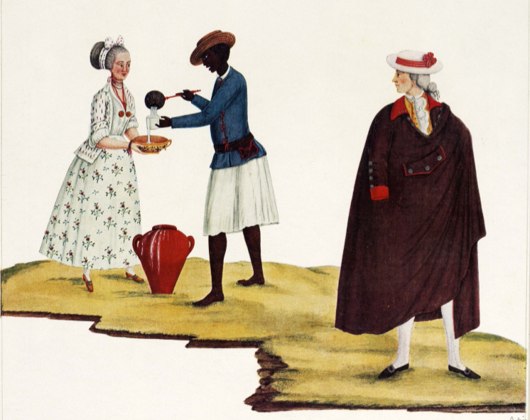 Escravo negro vendendo leite à uma mulher branca e homem vestido de casaco, chapéu e peruca. Rio de Janeiro. século XVIII.